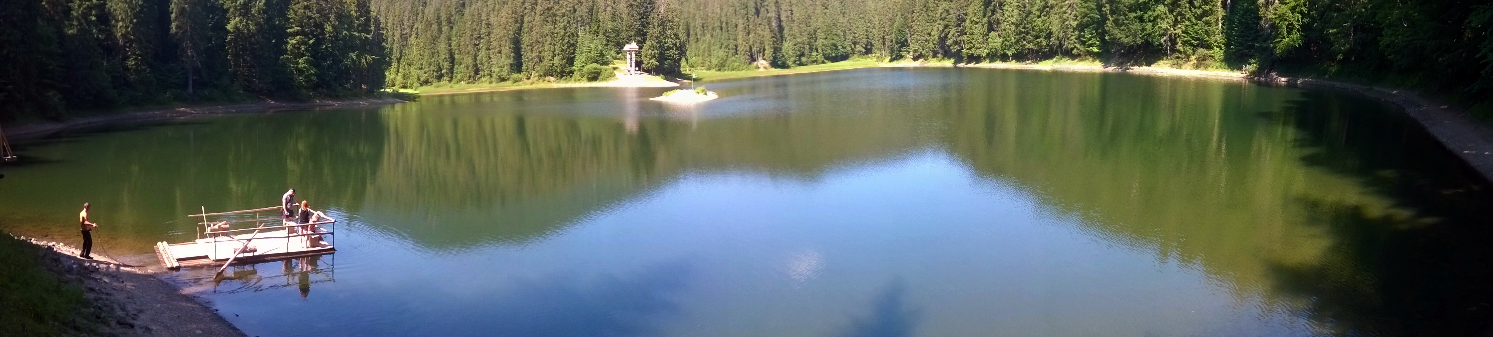 НПП** «Синевир», Міжгірський, Хустський райони